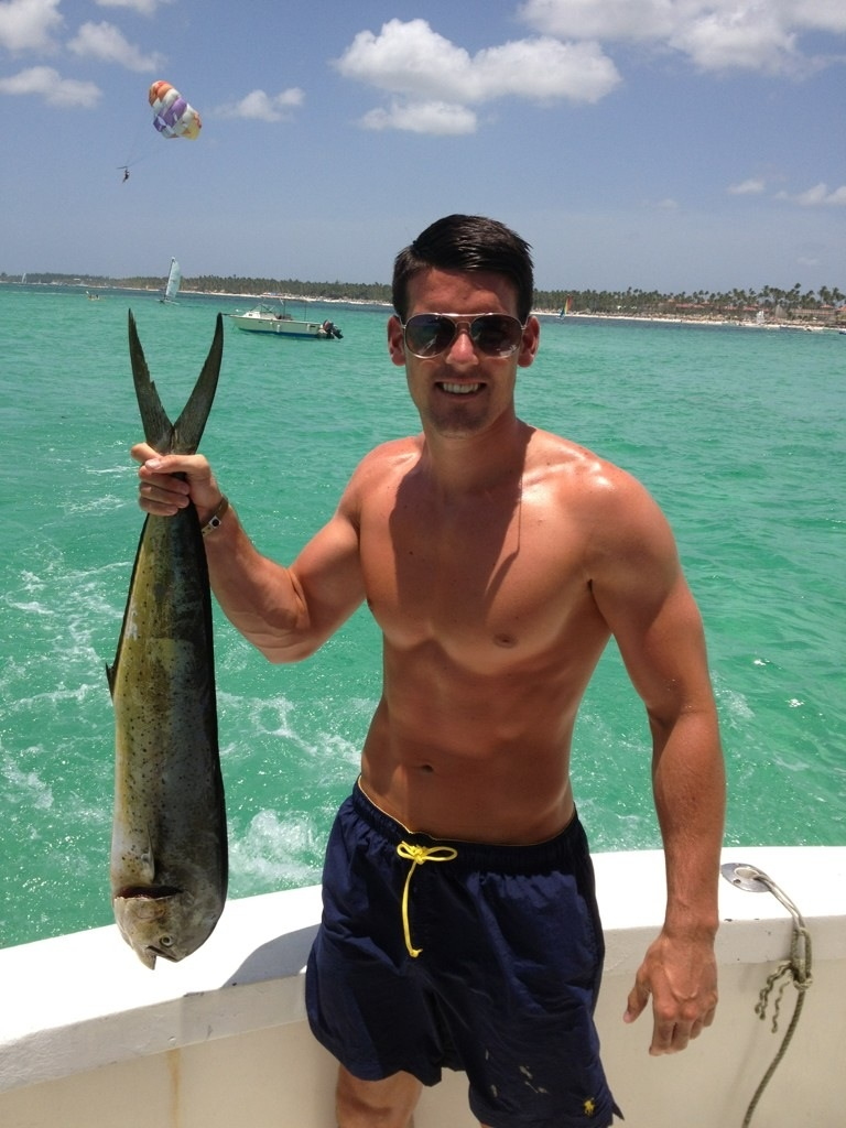 Mark Bradley